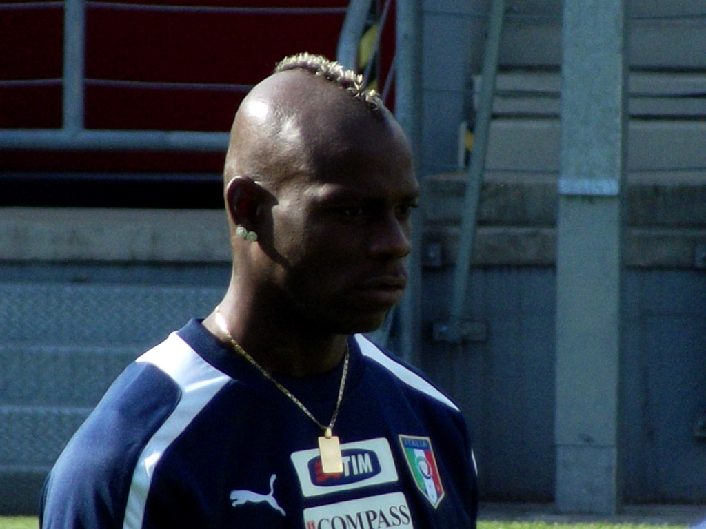 Zdjęcia zrobione podczas zgrupowania włoskich piłkarzy, powołanych na Euro 2012 w Casa Azzurri w Krakowie.